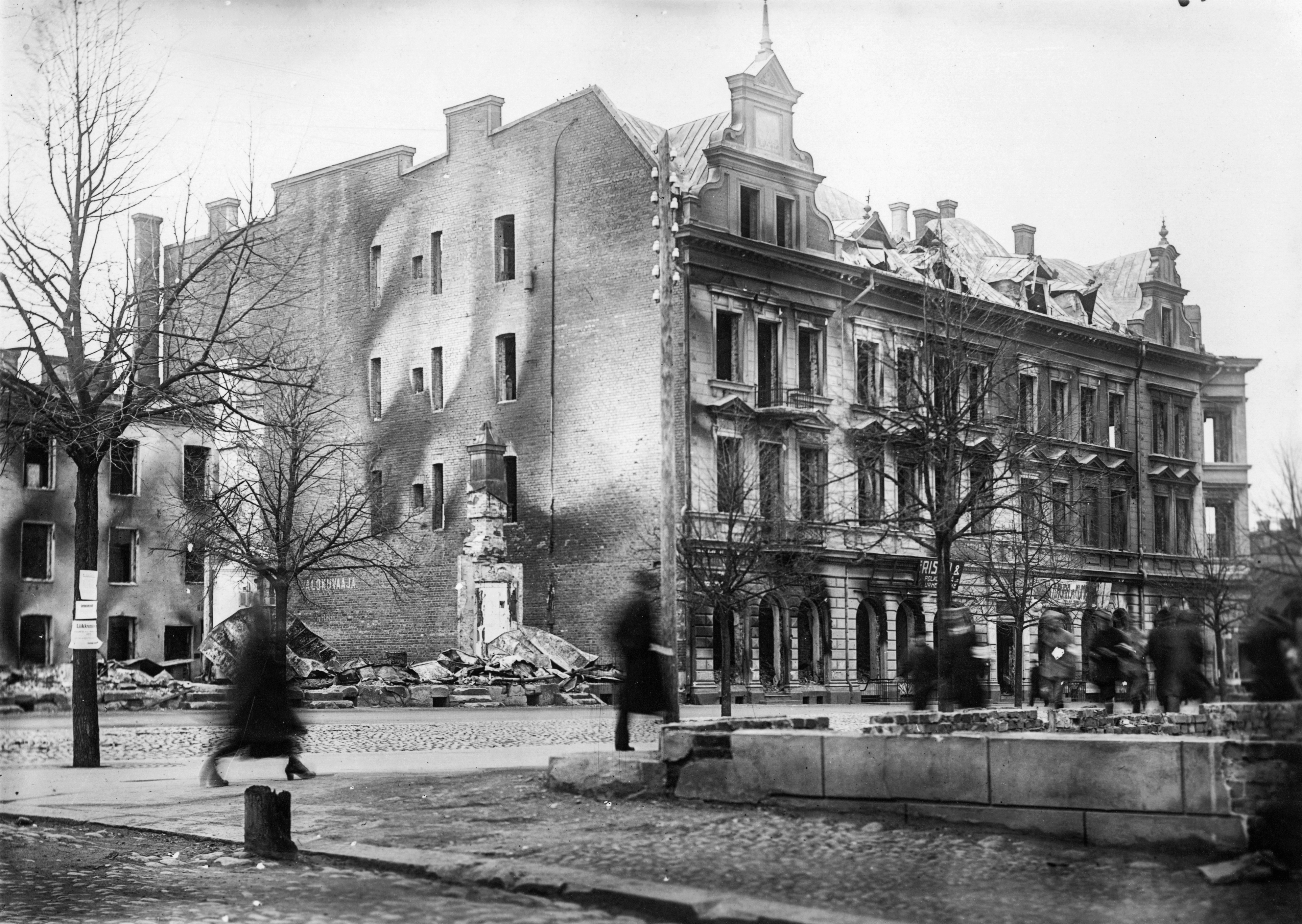 Osoitteessa Hämeenkatu 10 sijainnut uusrenessanssityylinen Hällströmin palatsi paloi Tampereen valtauksen yhteydessä.